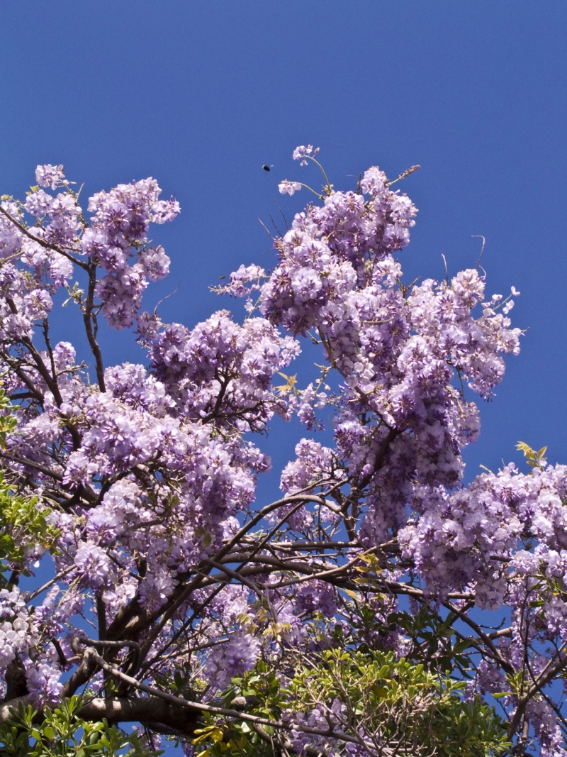 Glicinija